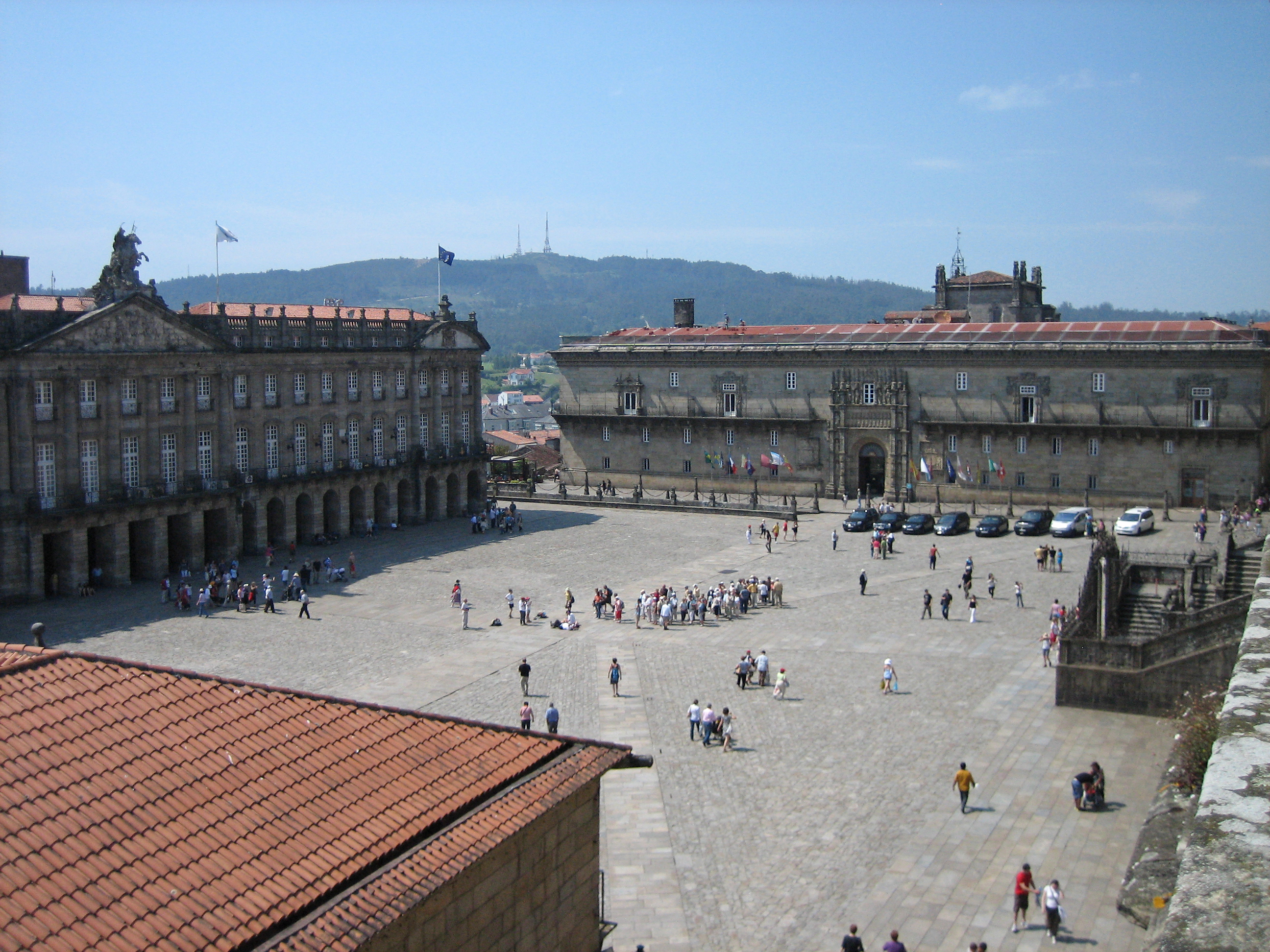 Praza do Obradoiro. Santiago de Compostela. Dende a Catedral.